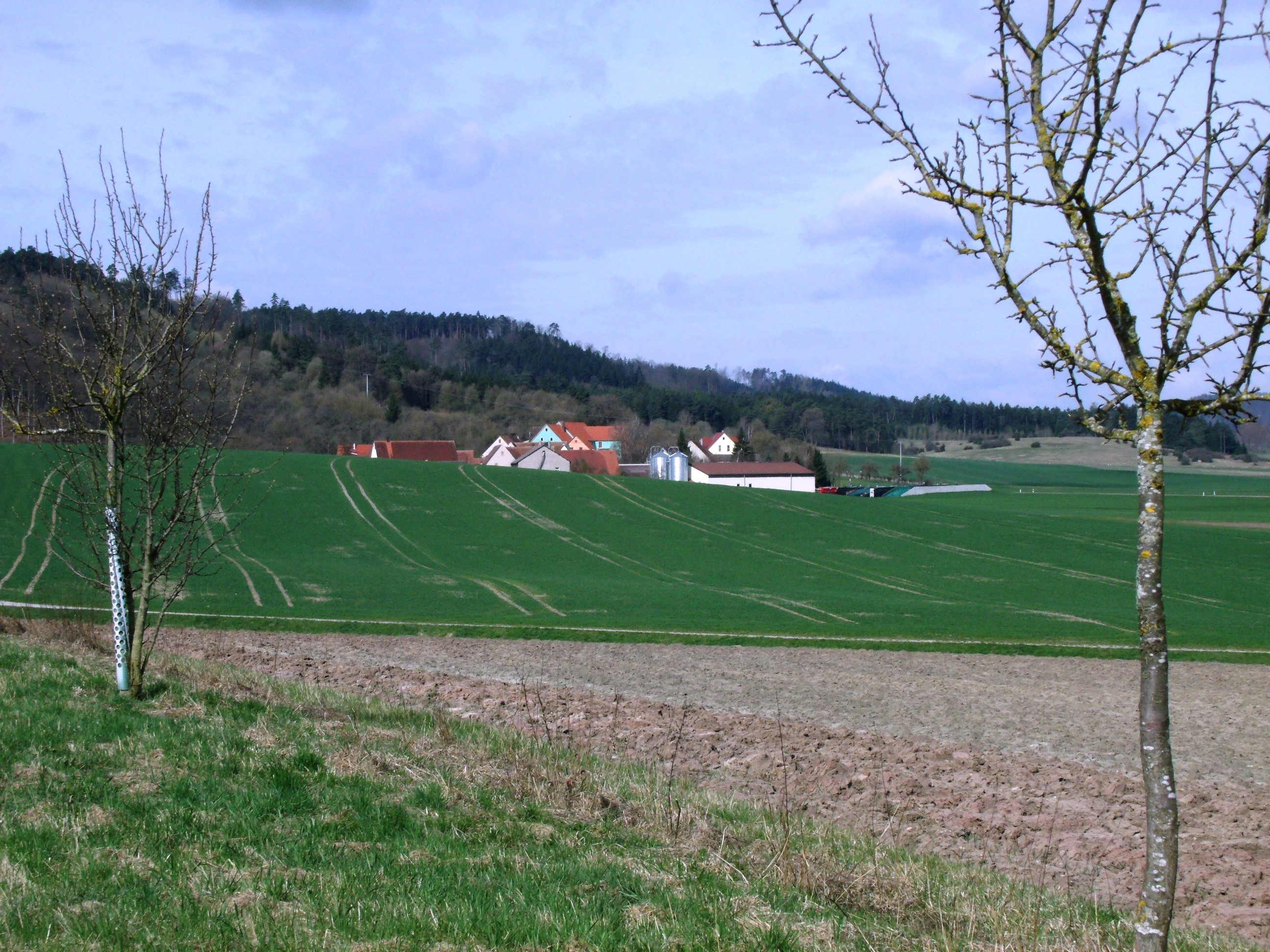 Hürbel am Rangen, Ortsteil von Lehrberg im mittelfränkischen Landkreis Ansbach